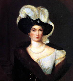 Jeanne Victoire de Sellon de La Turbie, baronne de l'Empire (26 avril 1810). Dame pour accompagner Pauline Bonaparte, princesse Borghèse en 1810. Née le 7 février 1777 - Genève (Suisse), décédée le 18 février 1849 - Turin (Italie) à l'âge de 72 ans Parents: Jean de Sellon 1736-1810 et Anne Marie Montz Mariages et enfants: Mariée en 1804 avec Louis Blancardi-Rovere, baron de La Turbie 1758-1814 (sans postérité), divorcés Mariée le 3 mai 1815 avec Aynard, duc de Clermont-Tonnerre 1769-1837 (sans postérité)